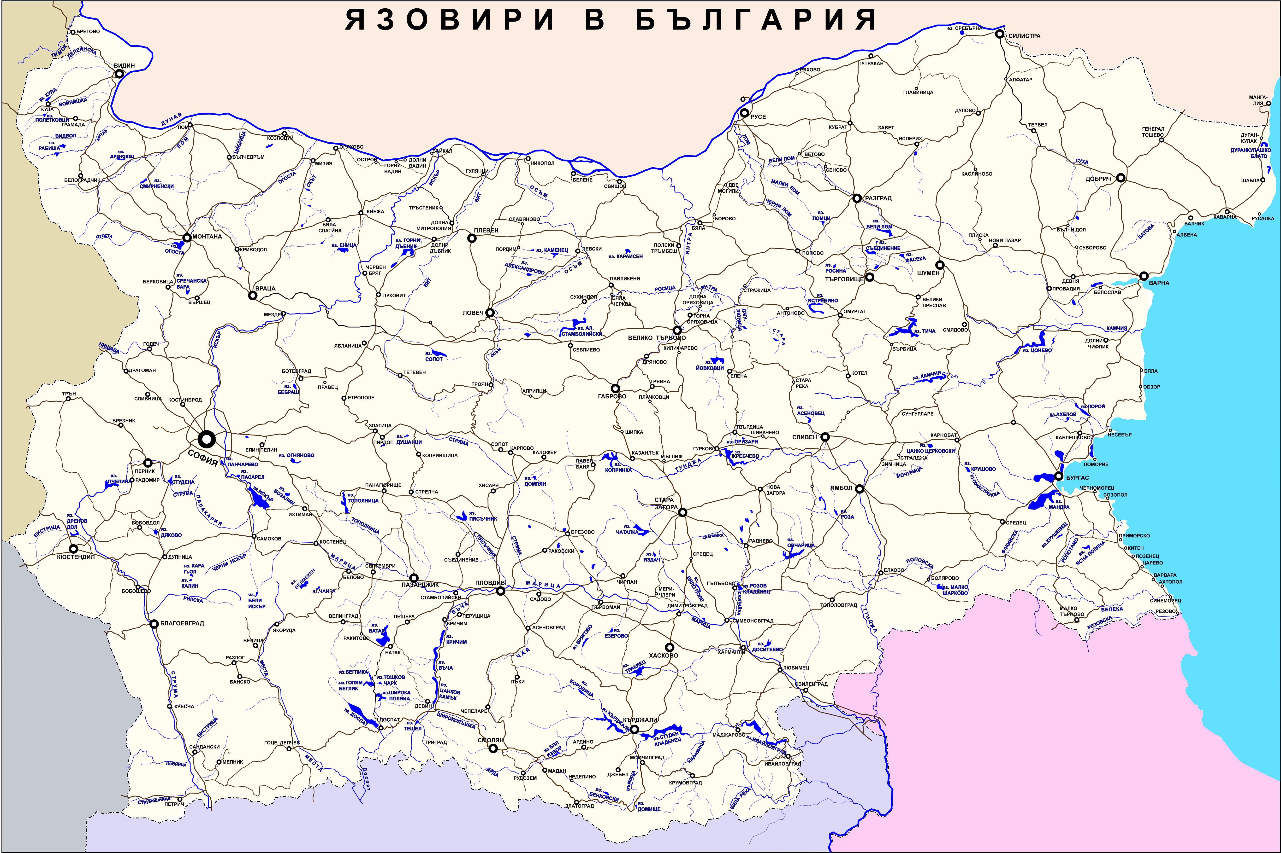 Показани са 80 язовира, част от пътната мрежа и по важните населени места.